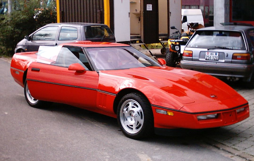 Chevrolet Corvette ZR1 1991 5.7L 6 Gang Schalter 400 PS in Reinach Aargau CH